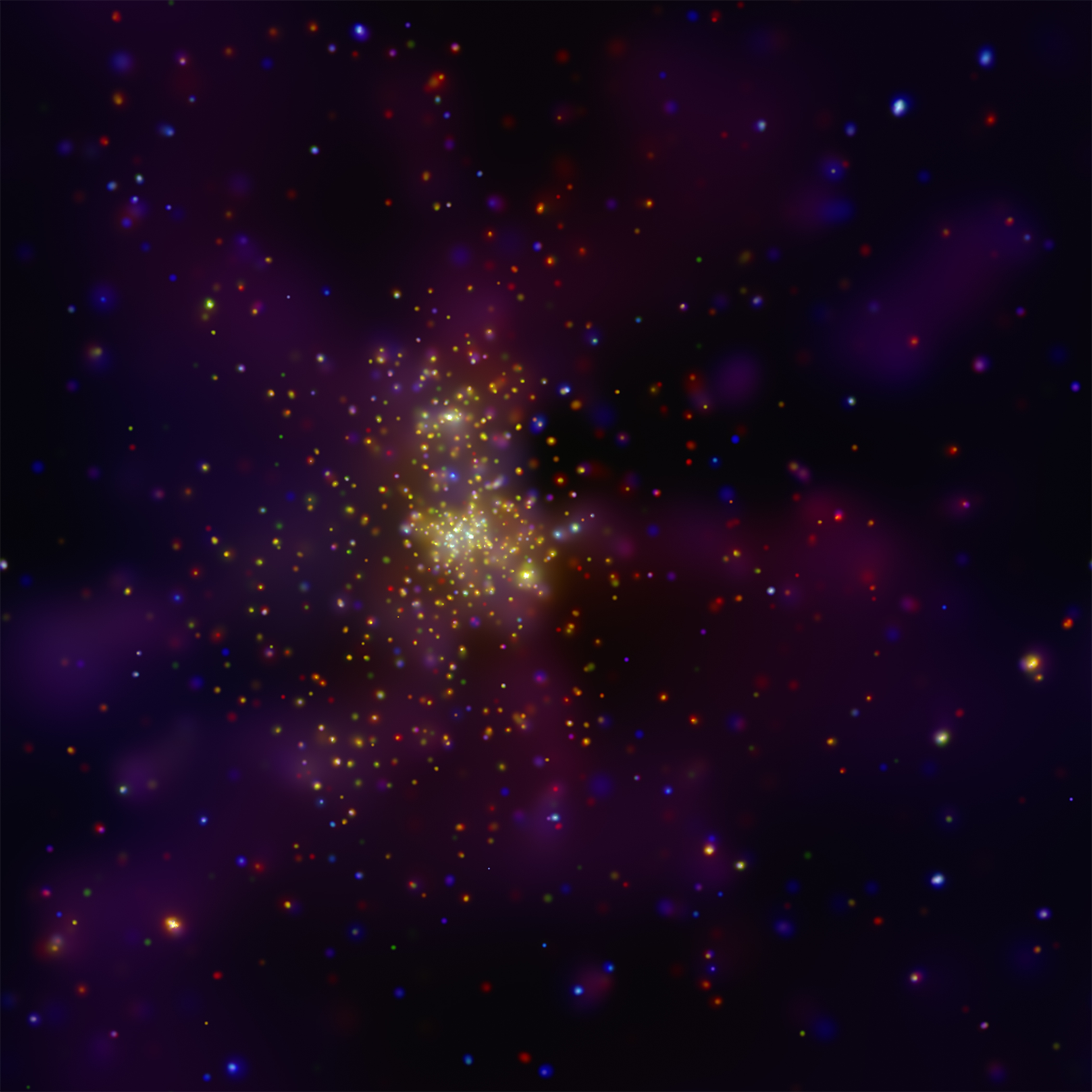 Westerlund 2 Cluster